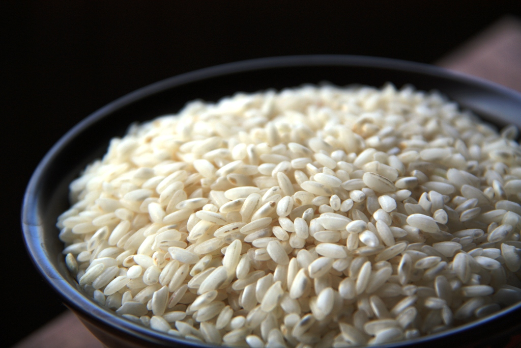 Grano del Arroz Carnaroli